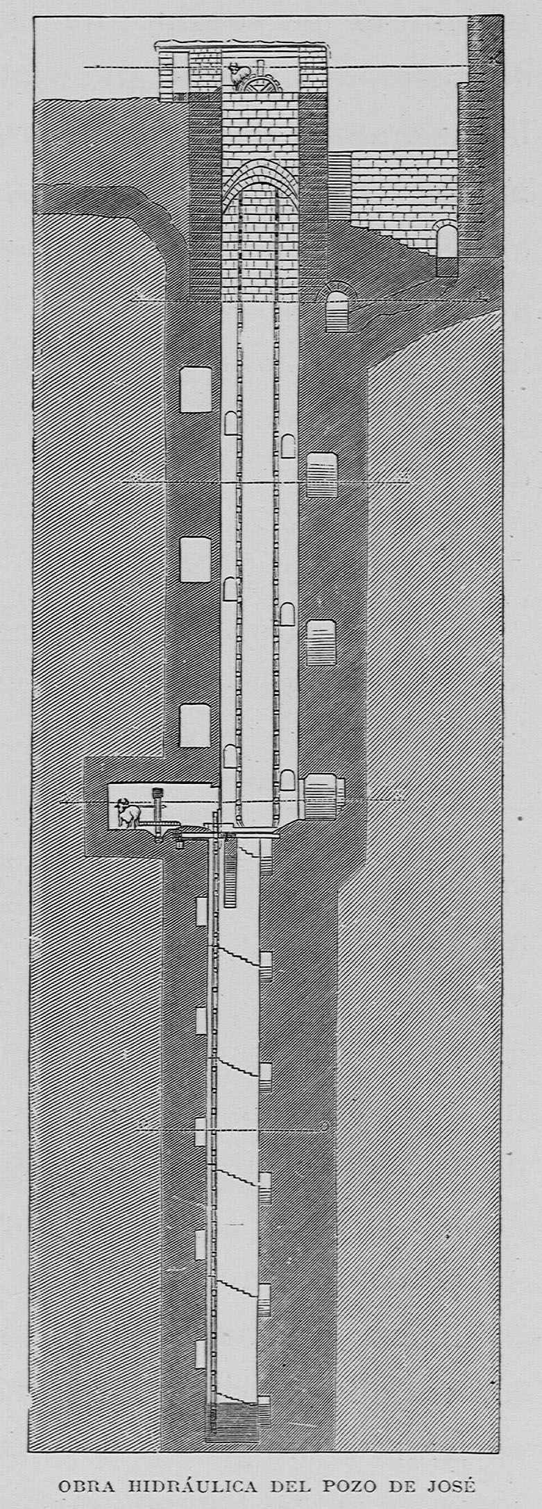 Autor: Ebers, Georg Moritz, 1837-1898 Descripción bibliográfica: Egipto / por Jorge Ebers ; traducción directa del alemán por Antonio Bergnes de las Casas, revisada y corregida por Cayetano Vidal de Valenciano. - Ed. monumental ilustrada con 650 grabados ... del reputado pintor Cárlos Werner. - Barcelona : Espasa y Compañía, 1882?. - 2 v. (X, 408, [1] p., [14] h. de lám. ; 438, [1] p., [14] h. de lám.). : il. ; 40 cm Materia: Egipto - Historia Materia: Egipto - Descripciones y viajes - Siglo 19 Notas: Palau, t. 5, p. 1, lo fecha de manera aproximada en 1882. - Port. a dos tintas. - Antep. - Ilustrada con 650 grabados intercalados en el texto y enriquecida con dos cartas geográficas tirada a tres tintas, una portada en colores y 24 magnificas imitaciones de las artísticas acuarelas del pintor Carlos Weiner Traductor:Bergnes de las Casas, Antonio, 1801-1879 Ilustrador:Werner, Karl, 1821-1888, il. Localización: Libro completo